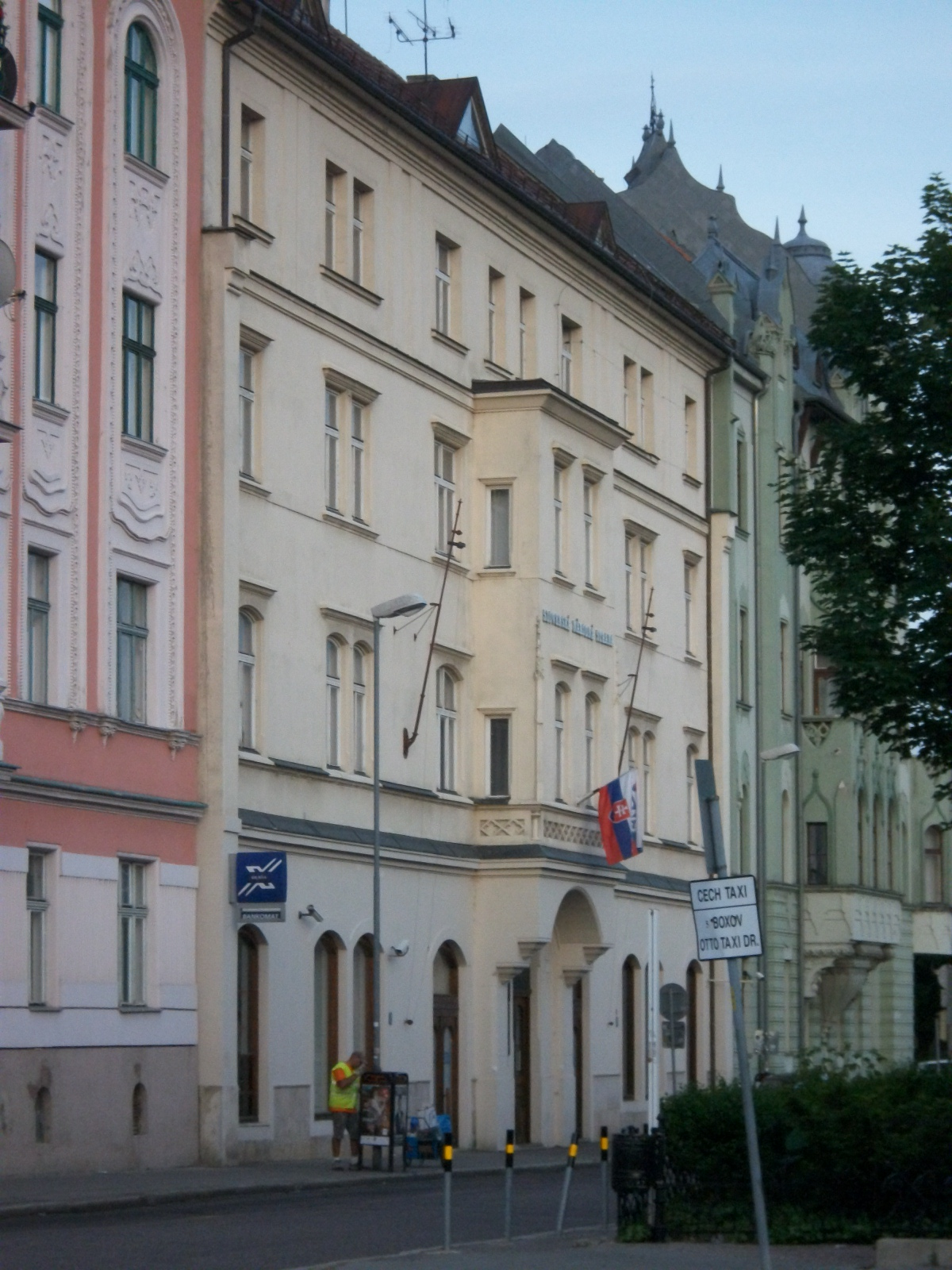 DOM BYTOVÝ